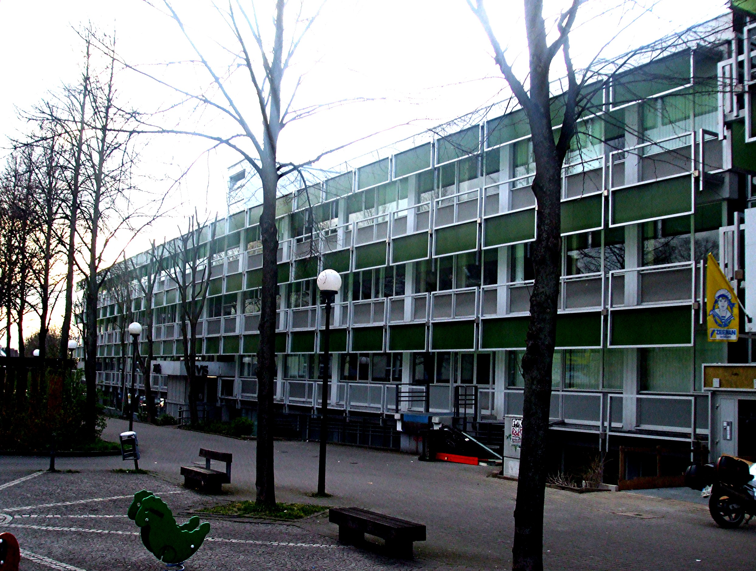 Gebäude der Stiftung für Hochschulzulassung in der Sonnenstraße 171, 44137 Dortmund